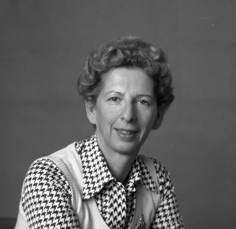 Dr. Gisela Niemeyer Richterin am Bundesverfassungsgericht Karlsruhe